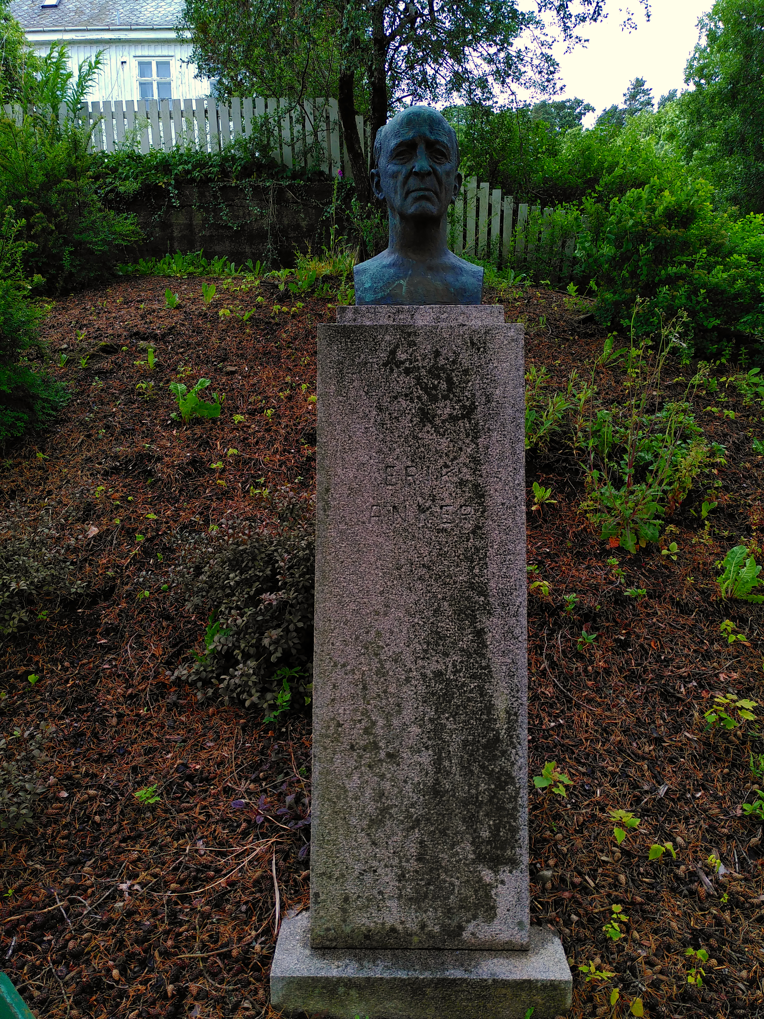 Byste av Erik Anker avduket 14. juni 1975 i Sokndal.